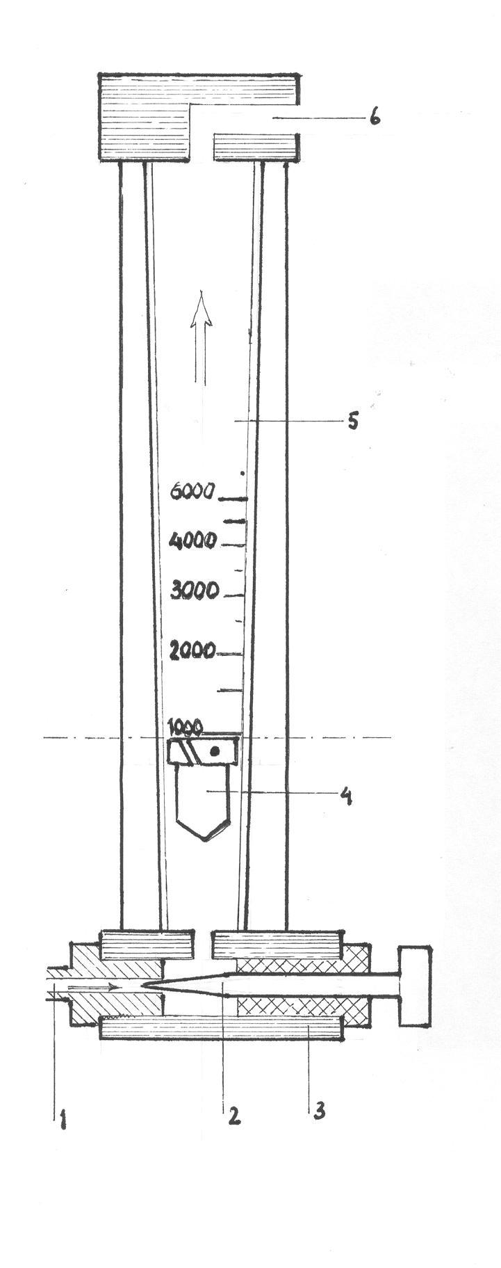 Rotametrissä virtaava fluidi5 kulkee alhaalta ylös. Kellukkeen4 korkeus määrittelee asteikolta fluidin nopeuden ilmaisevan lukeman.